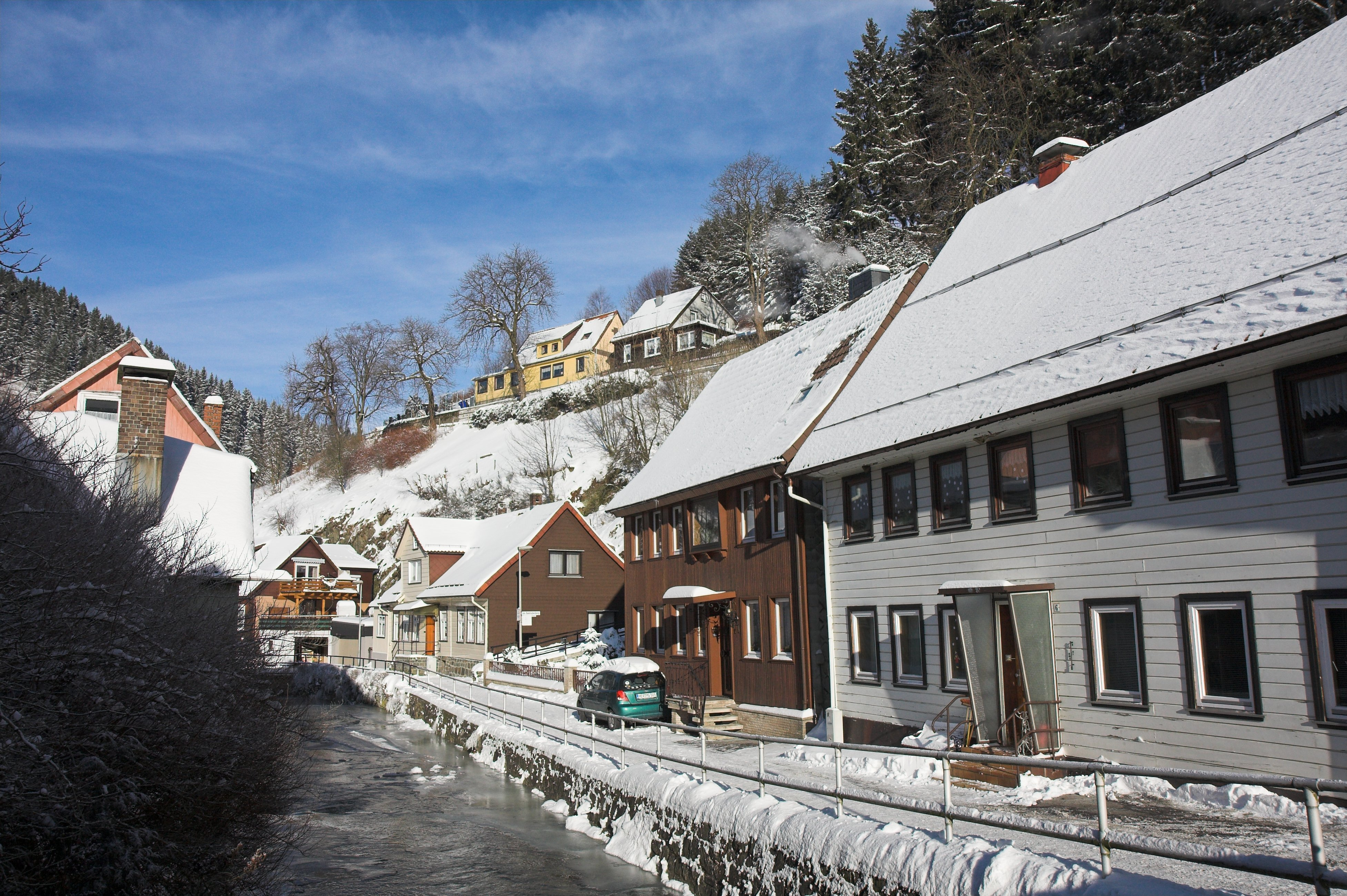 Die Innerste in Wildemann, rechts der Badstubenberg